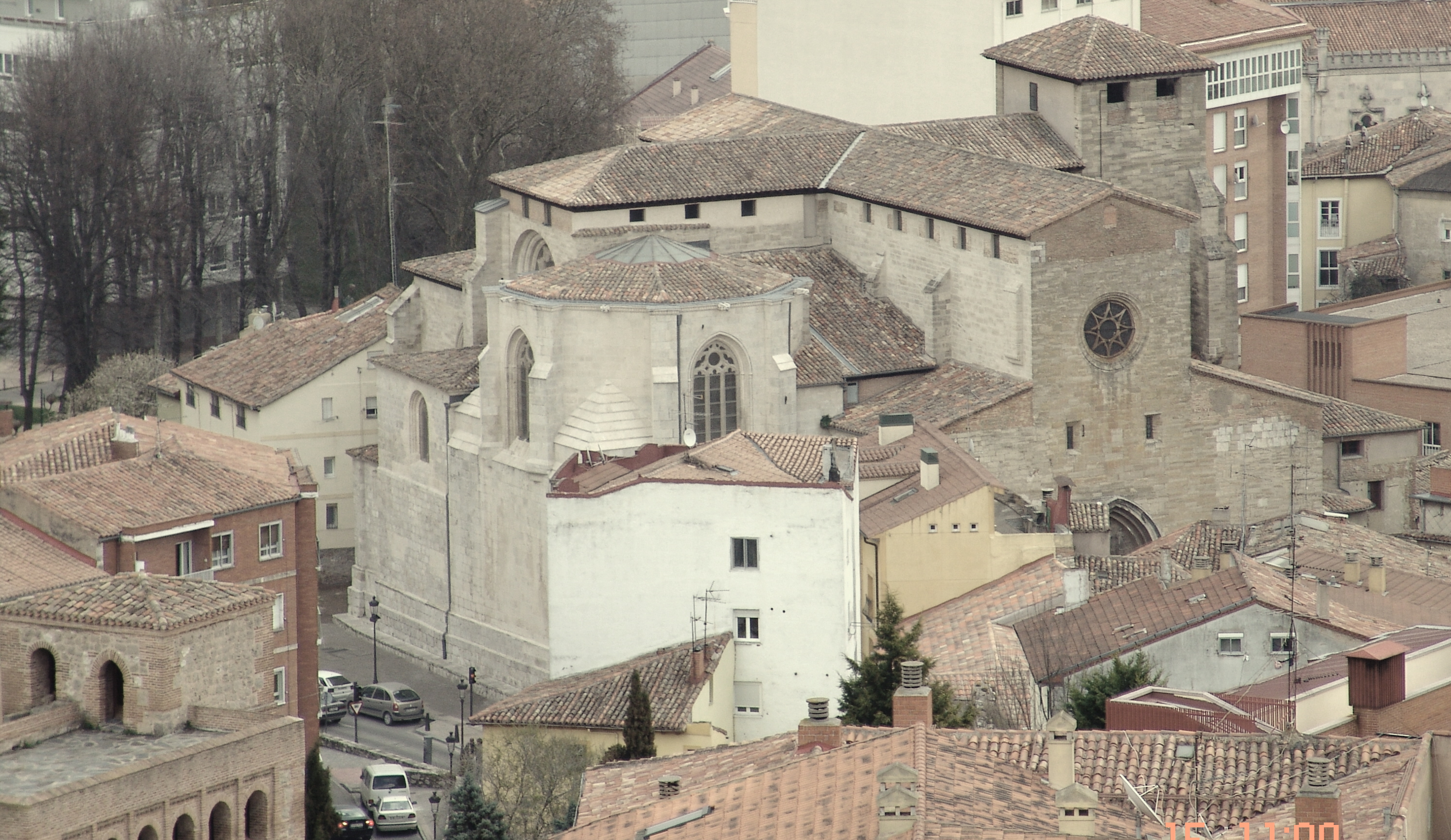 Vista de la “Iglesia de San Gil Abad” desde “El Castillo” , Burgos, España